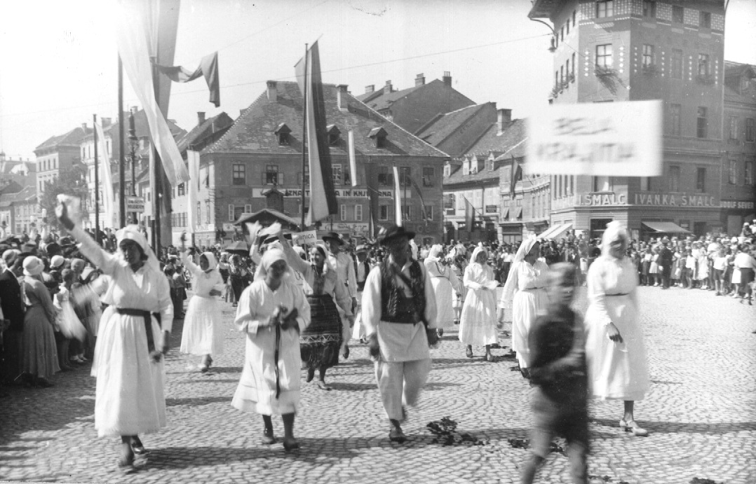 Kongres narodnih noš v Ljubljani, skupina Bela krajina